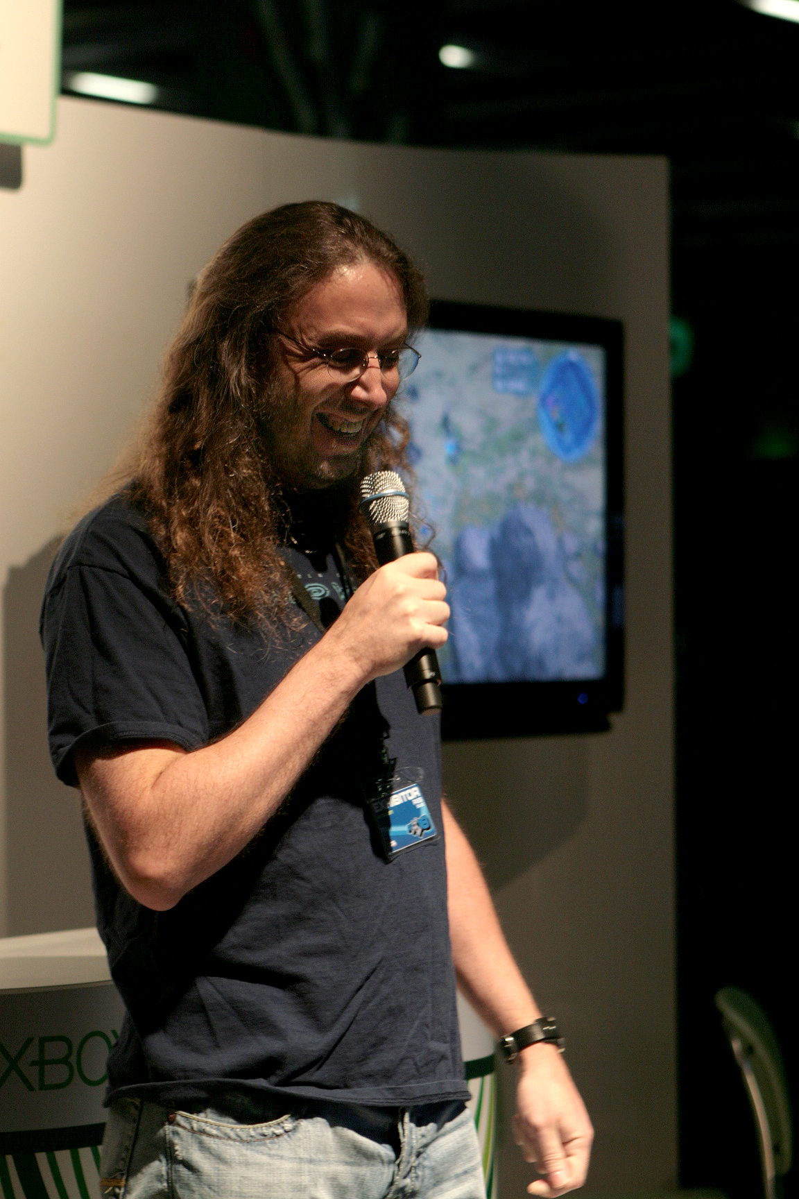 Developer Graeme Devine, at PAX 2009